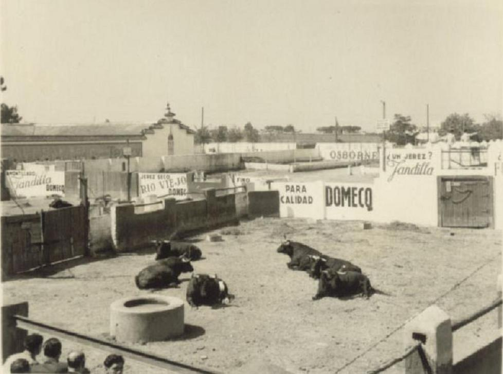 Bonita vista del apartado de toros en la Venta de Antequera durante la Feria de primavera del año 1955